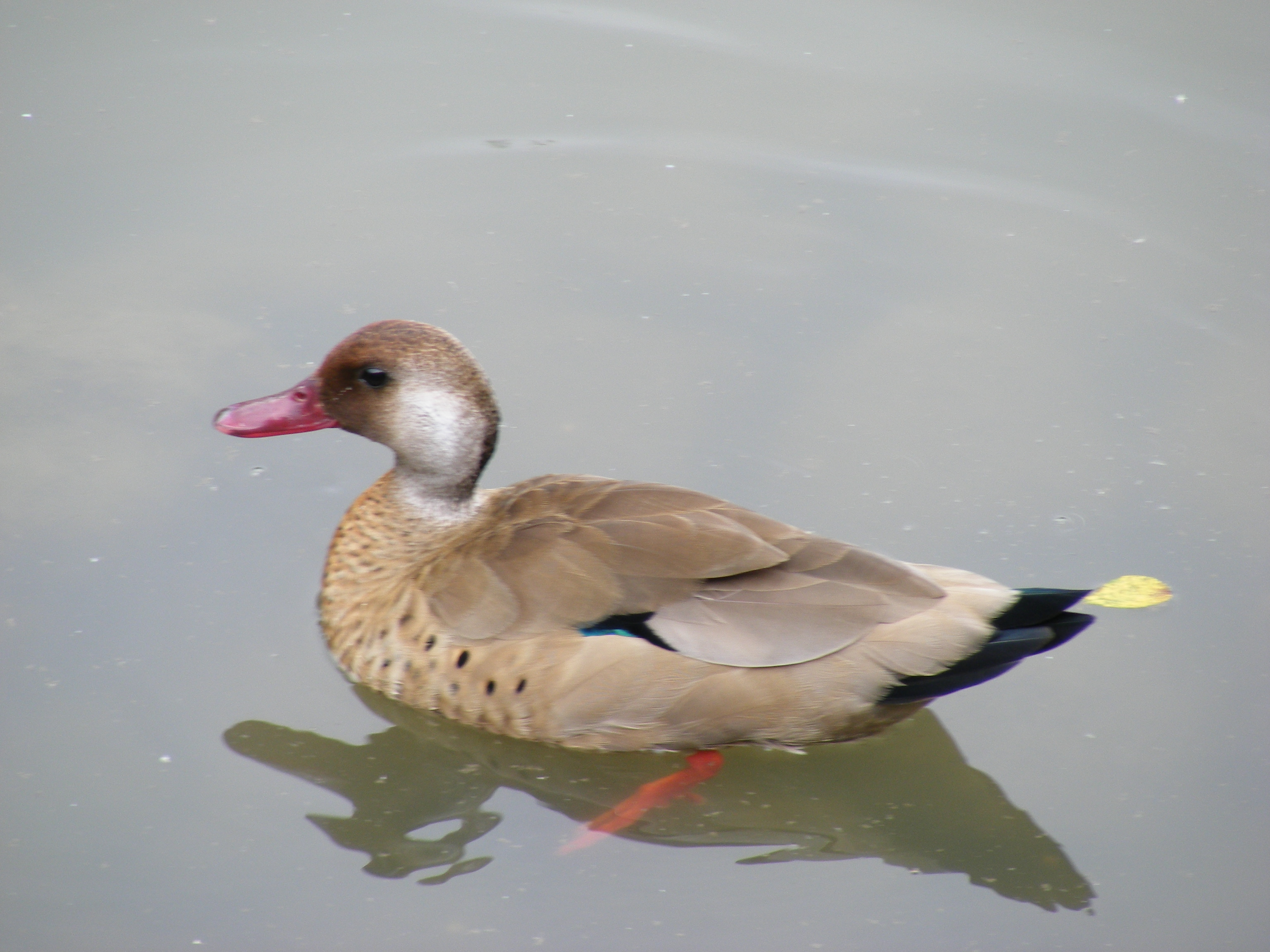 A male Greater Brazilian Teal